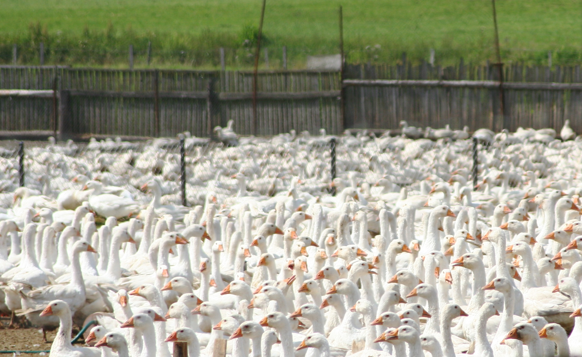 Ferma gęsi w miejscowości Odrynki, gmina Narew, woj. podlaskie